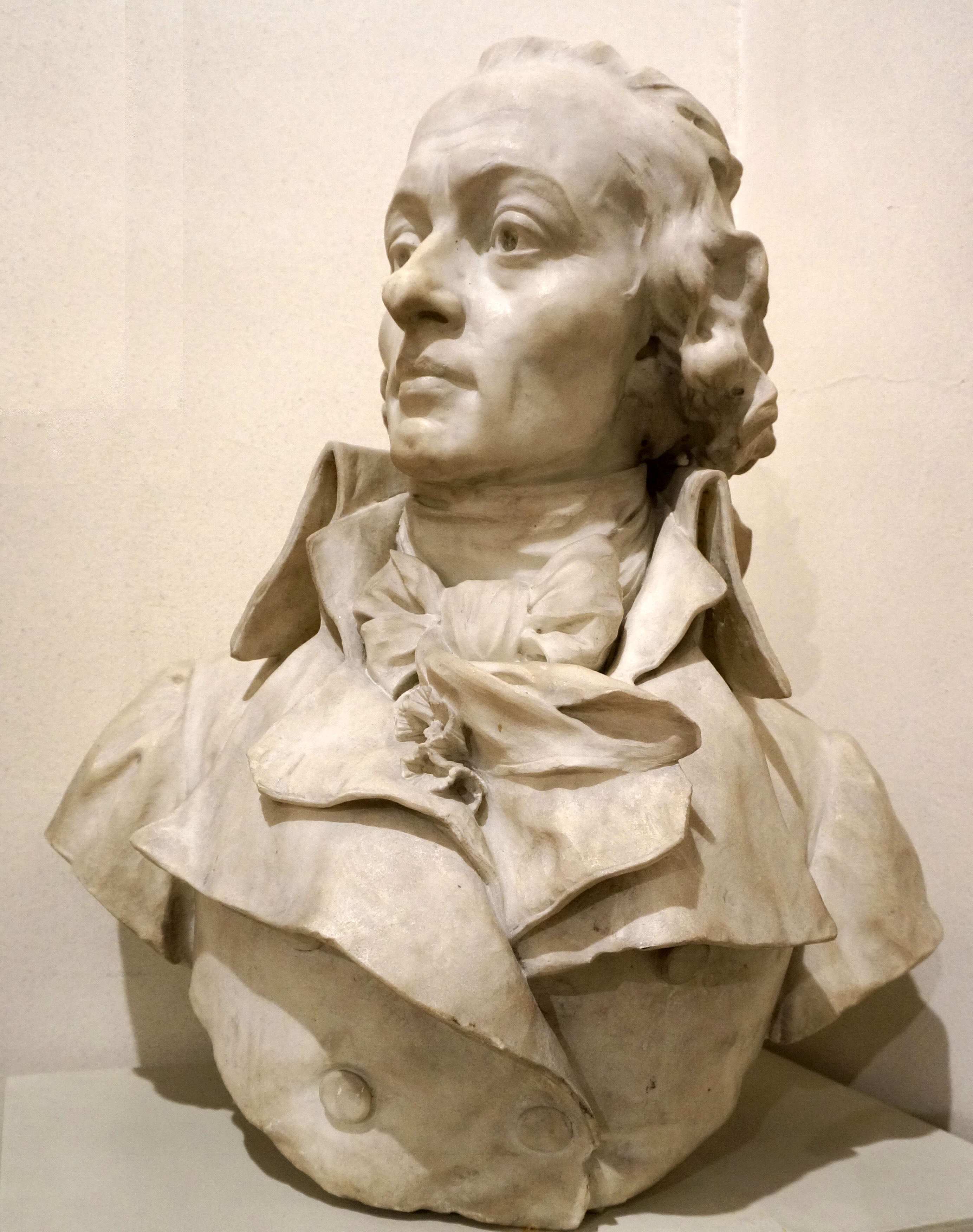 au Musée d'art et d'archéologie de Laon, salle du premier.